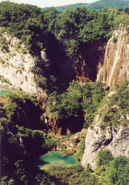 Park Narodowy Jeziora Plitvickie w Chorwacji. Zdjęcie wykonane (wrzesień 2003), zeskanowane i dodane przez użytkownika Scythian.